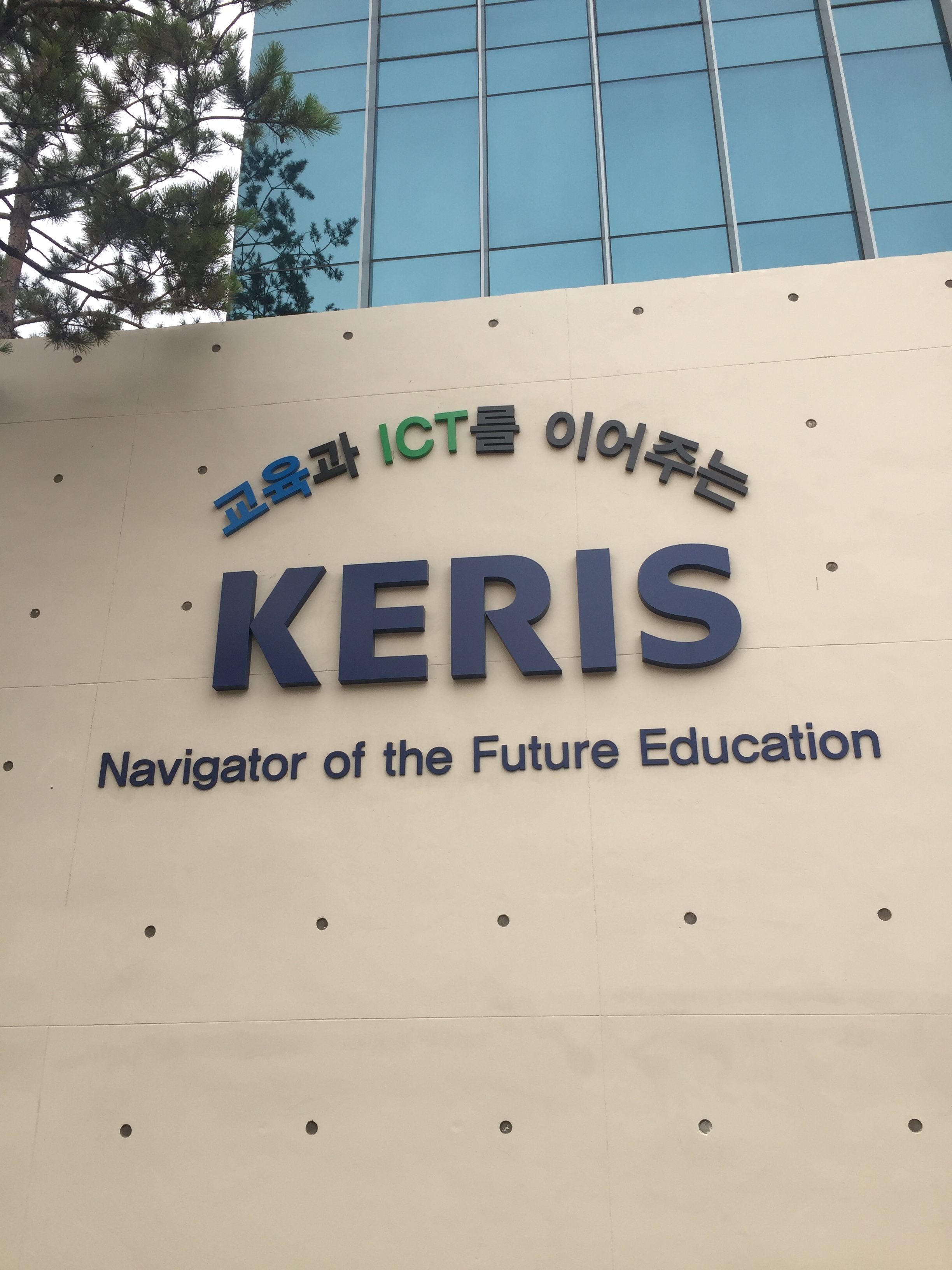 Keris logo